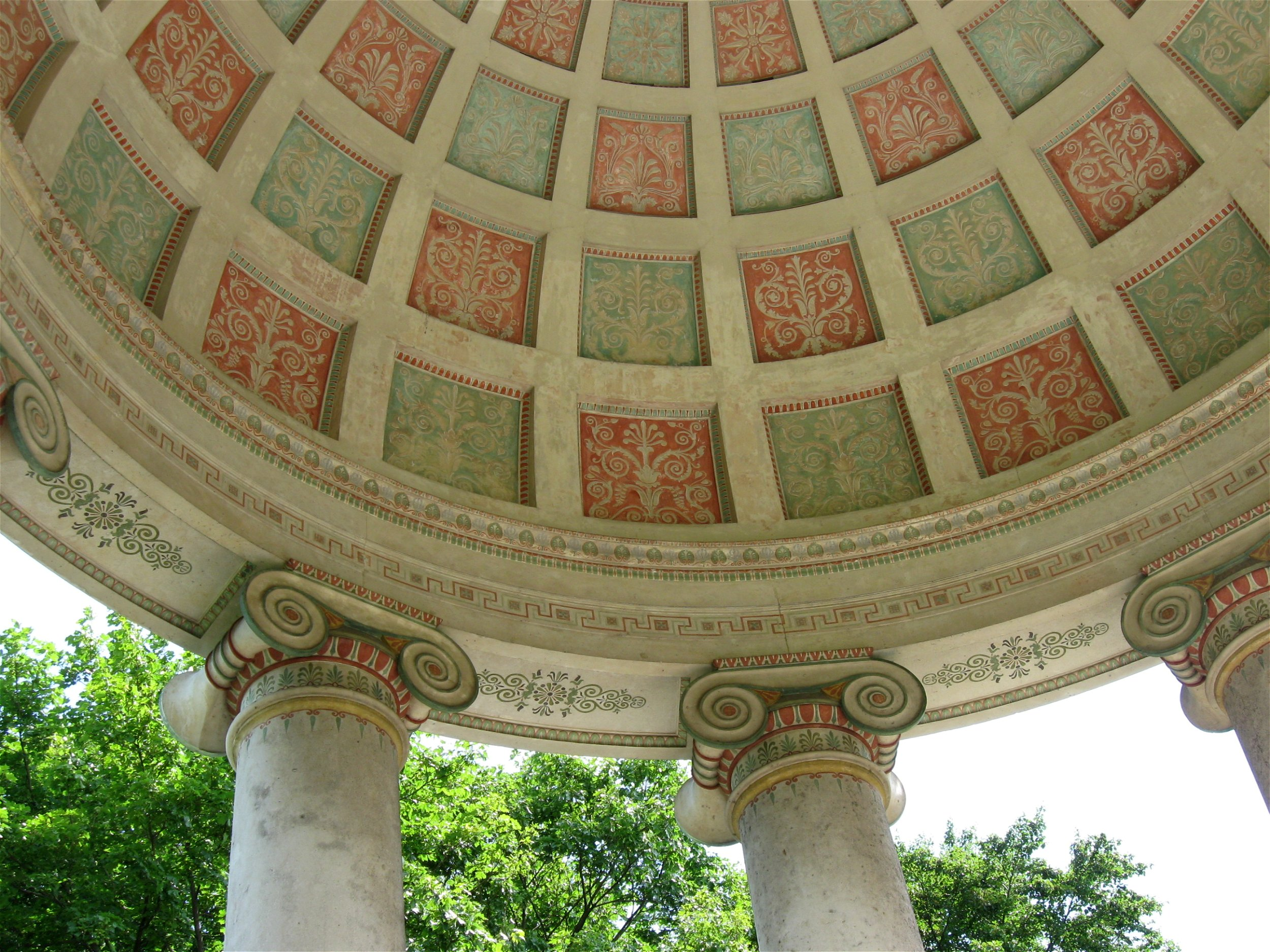 Monopteros, Englischer Garten, München (Detail)